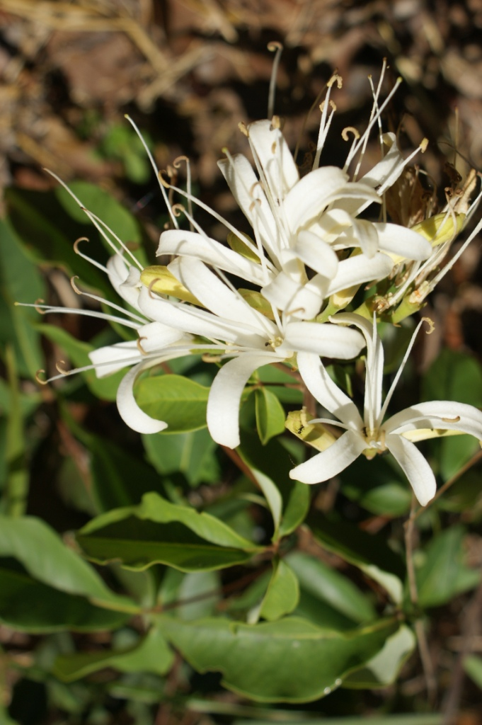 Spiranthera odoratissima - RUTACEAE Jardim Botânico de Brasília, Distrito Federal - Brasil